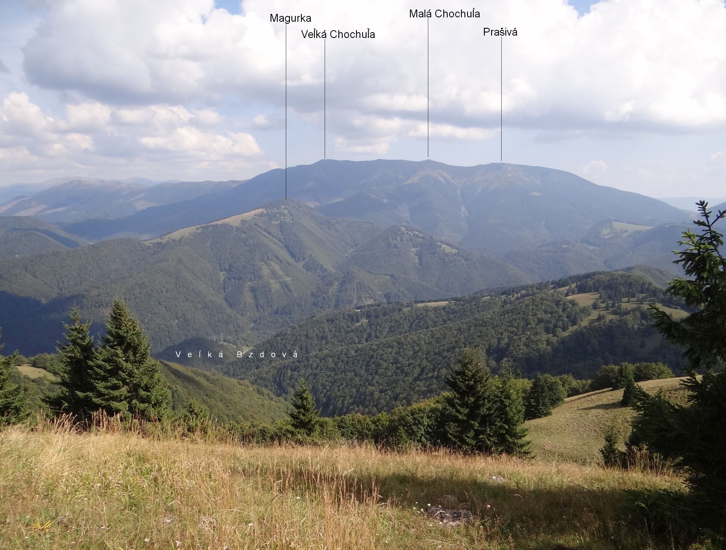 Veľká Bzdová, Veľká Chochuľa, Malá Chochuľa. View from Veľká Fatra